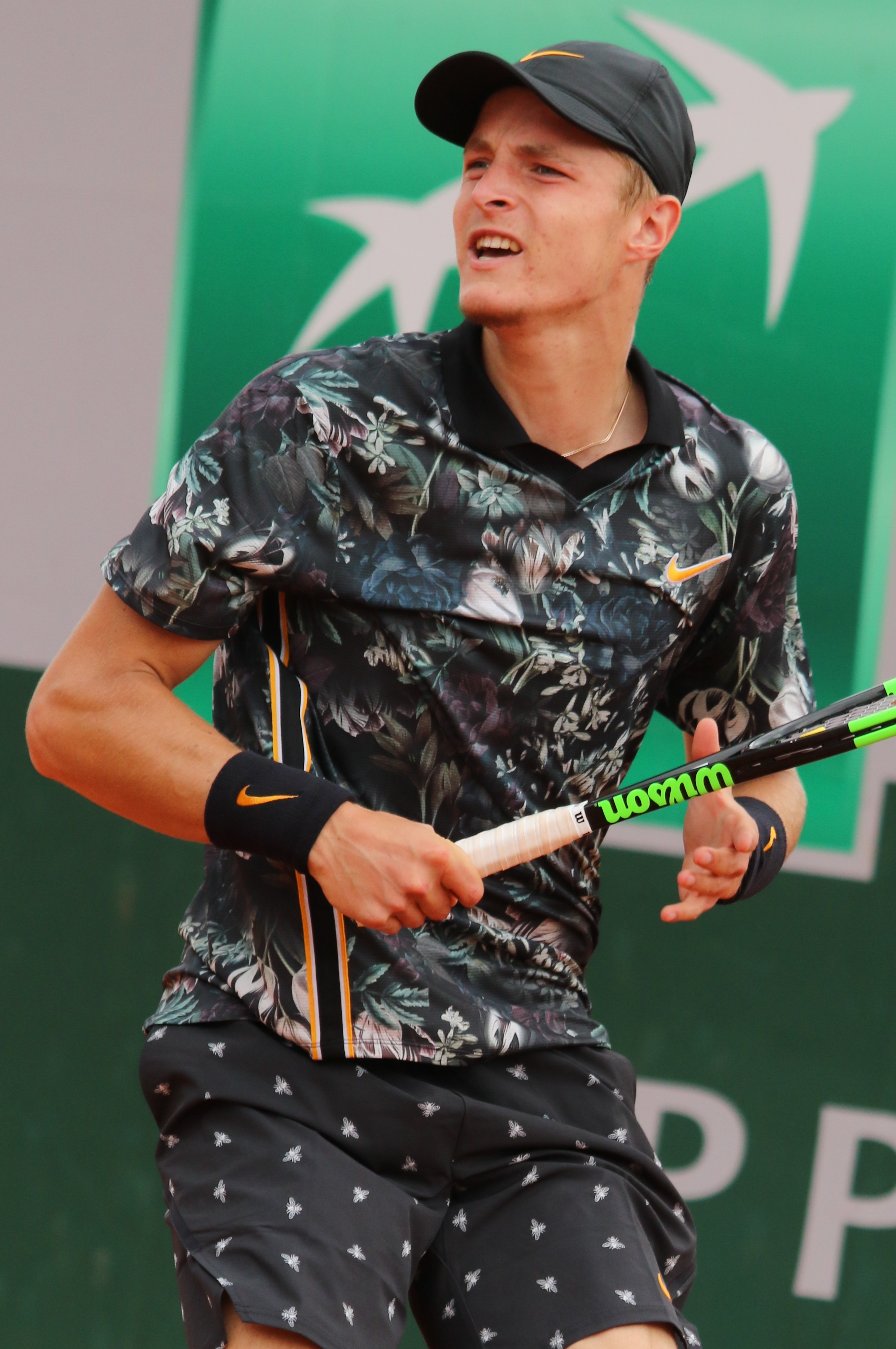 Molleker RGQ19 (44)